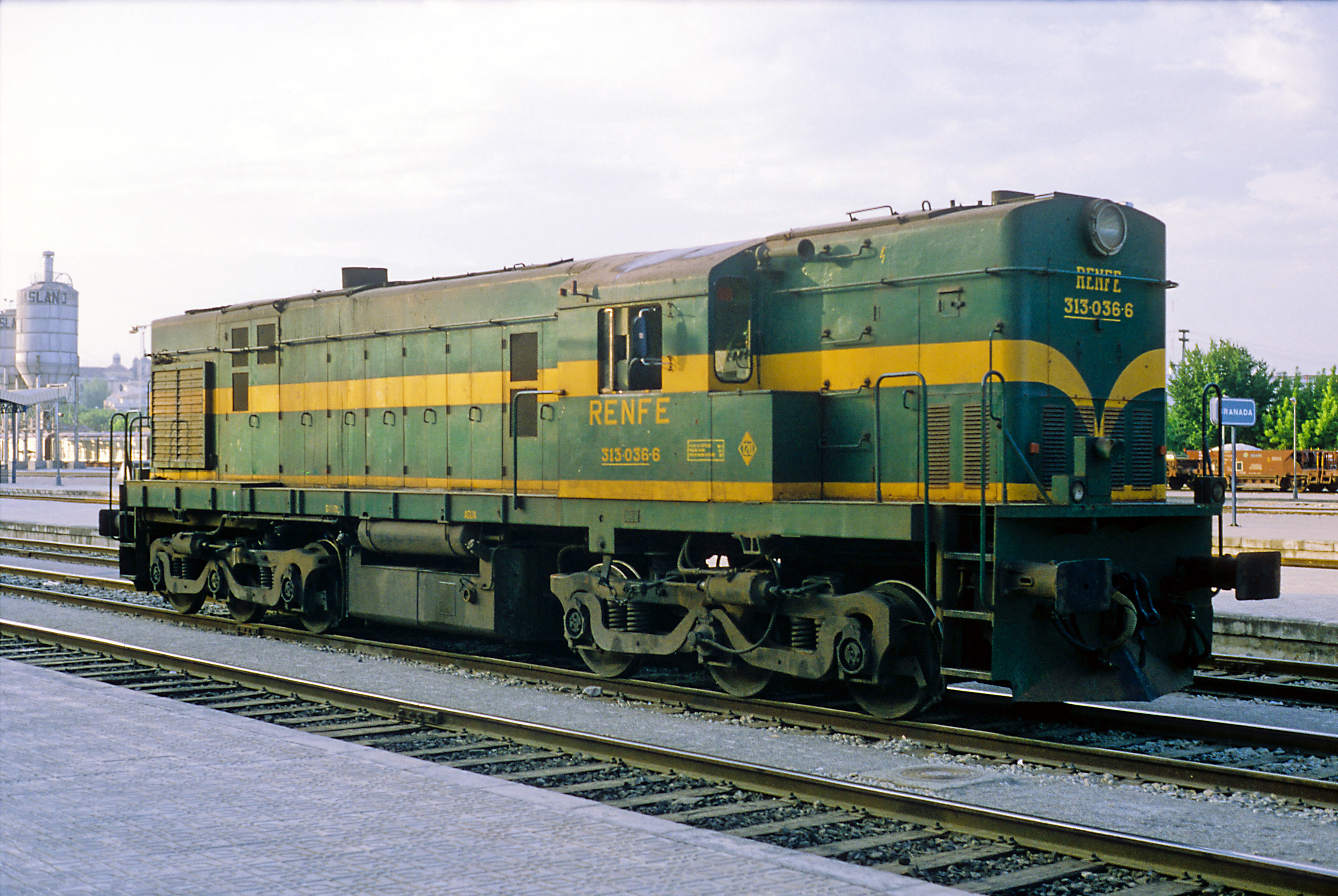 typischer Amerikaner, Standardbauart von Alco. Die »Monocabina«-Maschinen der Reihe 319 waren im Lieferzustand ähnlich, die Achsfolge der leichteren Maschinen der Reihe 313 mit nur vier Fahrmotoren ist jedoch (A1A)(A1A).